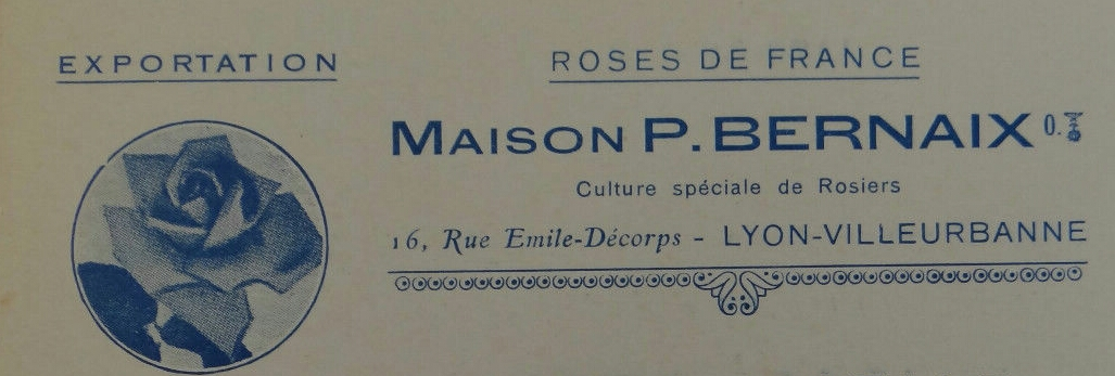 En-tête de la maison P. Bernaix vers 1920.